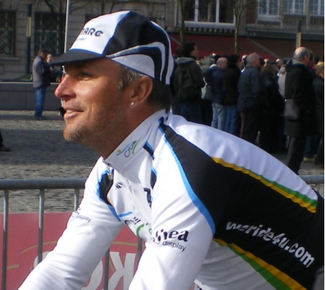 Steffen Wesemann - 3daagse van West-Vlaanderen 2008